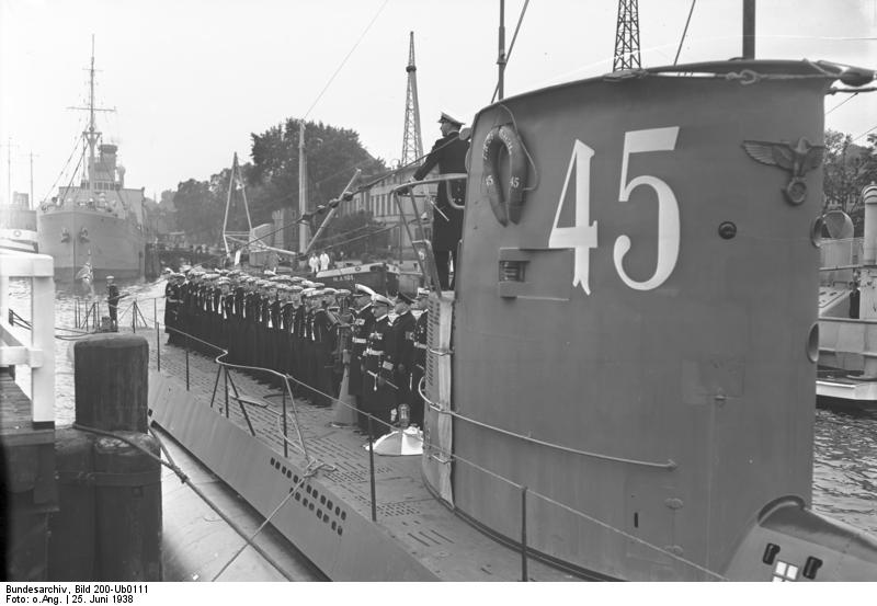 Kiel, Indienststellung U-45 Indienststellung G.580/U-45 am 25.06.1938 [Kiel, Krupp Germaniawerft AG.- Indienststellung U-Boot U-45, Mannschaft bei Übernahme des Bootes, Kapitänleutnant (KptLt) Klaus Ewerth (auf Gefechtsturm, Ehrenabordnung), Kommandant U-45 Kapitänleutnant (KptLt) Alexander Gelhaar (hintere Reihe, erster M]